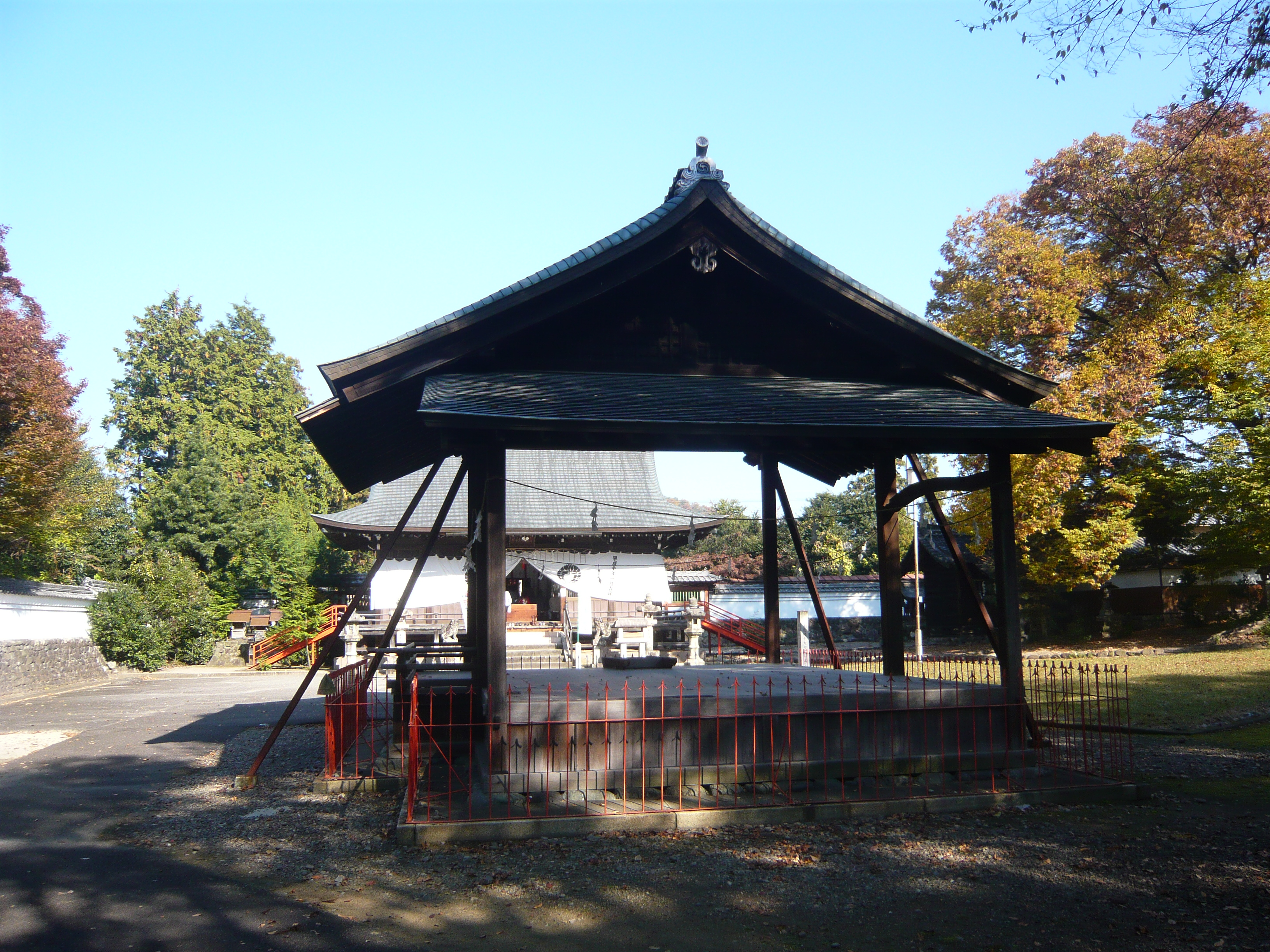 Kasuga Shrine 春日神社 (関市) 能舞台（春日神社 (関市)）,Seki,Gifu,Japan（岐阜県関市）で撮影。